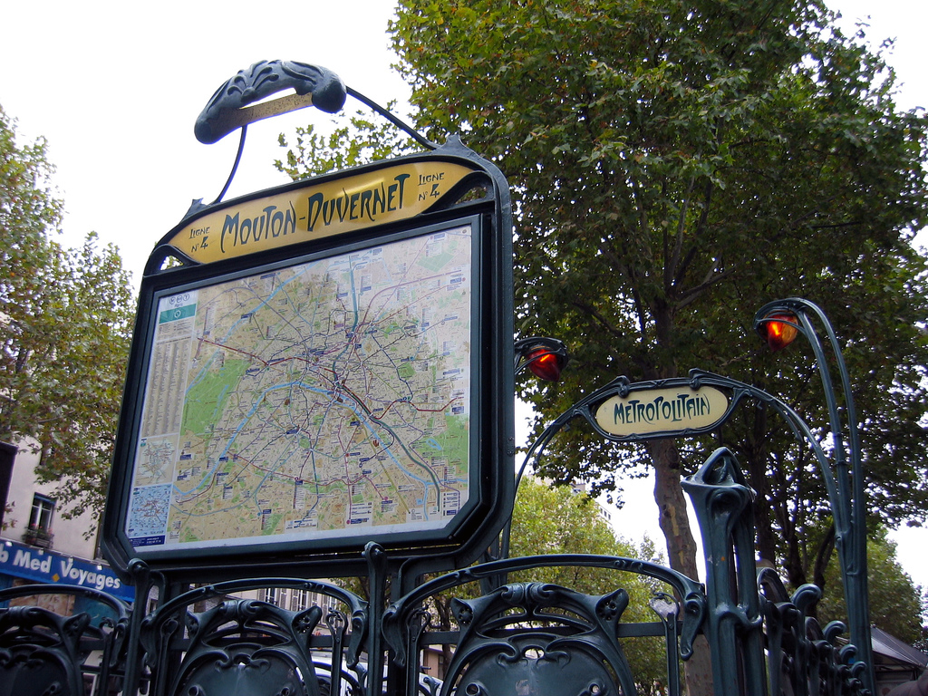 Entrée de la station Mouton - Duvernet, ligne 4